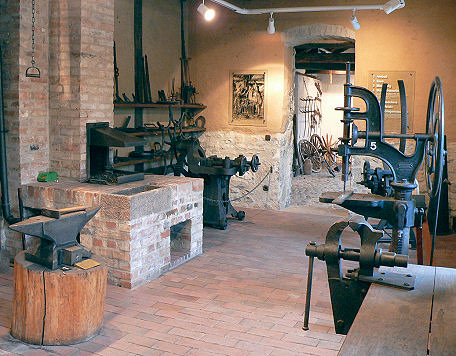 Oringalgetreu hergerichtete Schmiedewerkstaatt des 19. Jahrhunderts im Heinrich Büssing-Haus in Wolfsburg-Nordsteimke